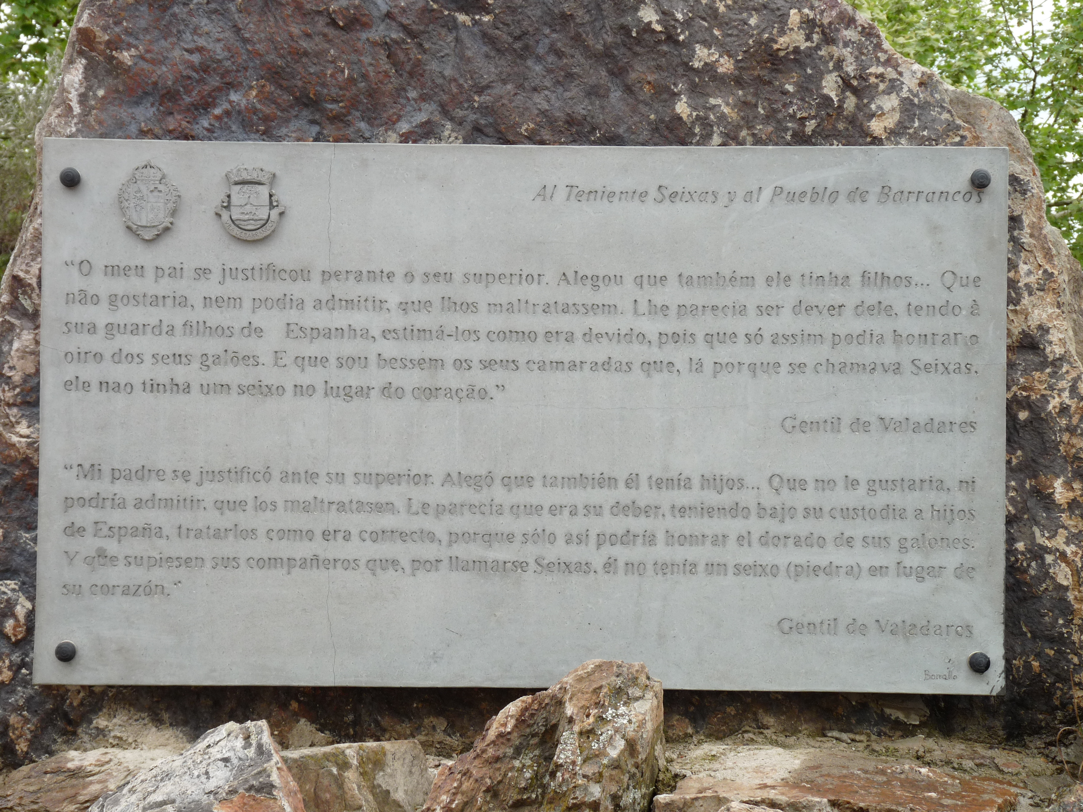 Detalle del monumento "al teniente Seixas y al pueblo de Barrancos" inaugurado en Oliva de la Frontera (Badajoz) el 23 de abril de 2010.